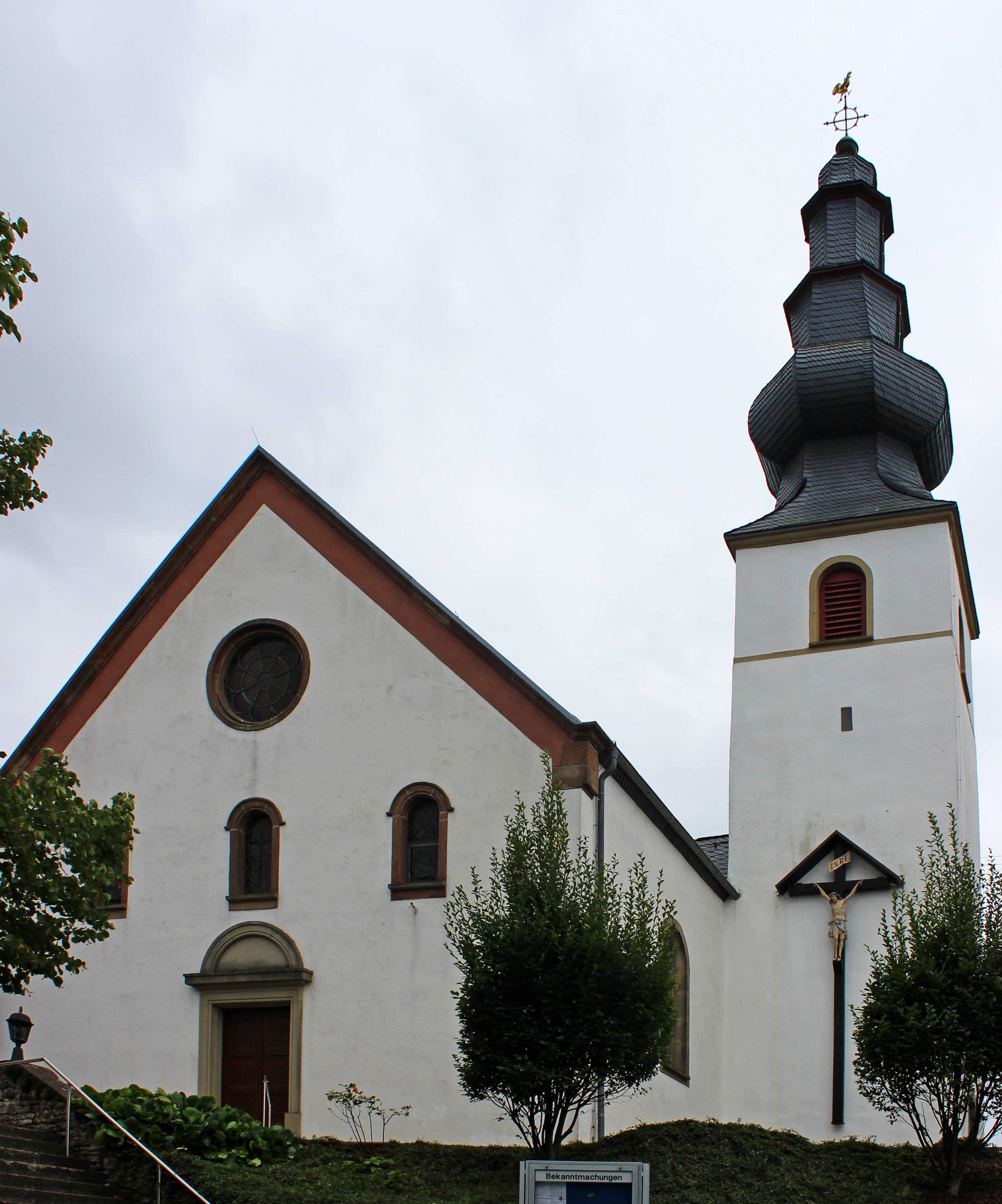 Die katholische Kirche St. Remigius in Leidingen, Gemeinde Wallerfangen, Landkreis Saarlouis, Saarland.